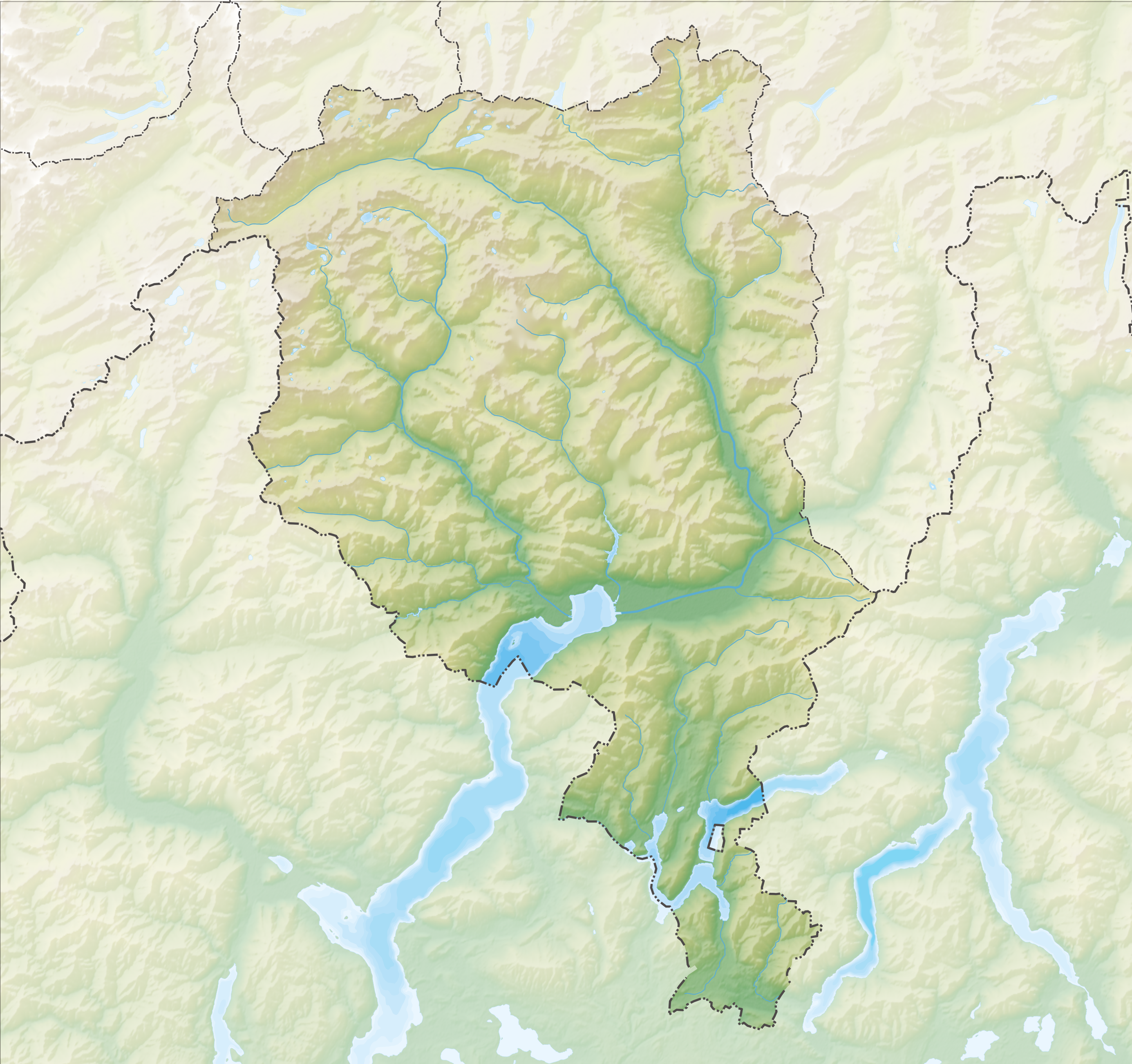 Reliefkarte des Kantons Tessin Topographischer Hintergrund: NASA Shuttle Radar Topography Mission (public domain). SRTM3 v.2.